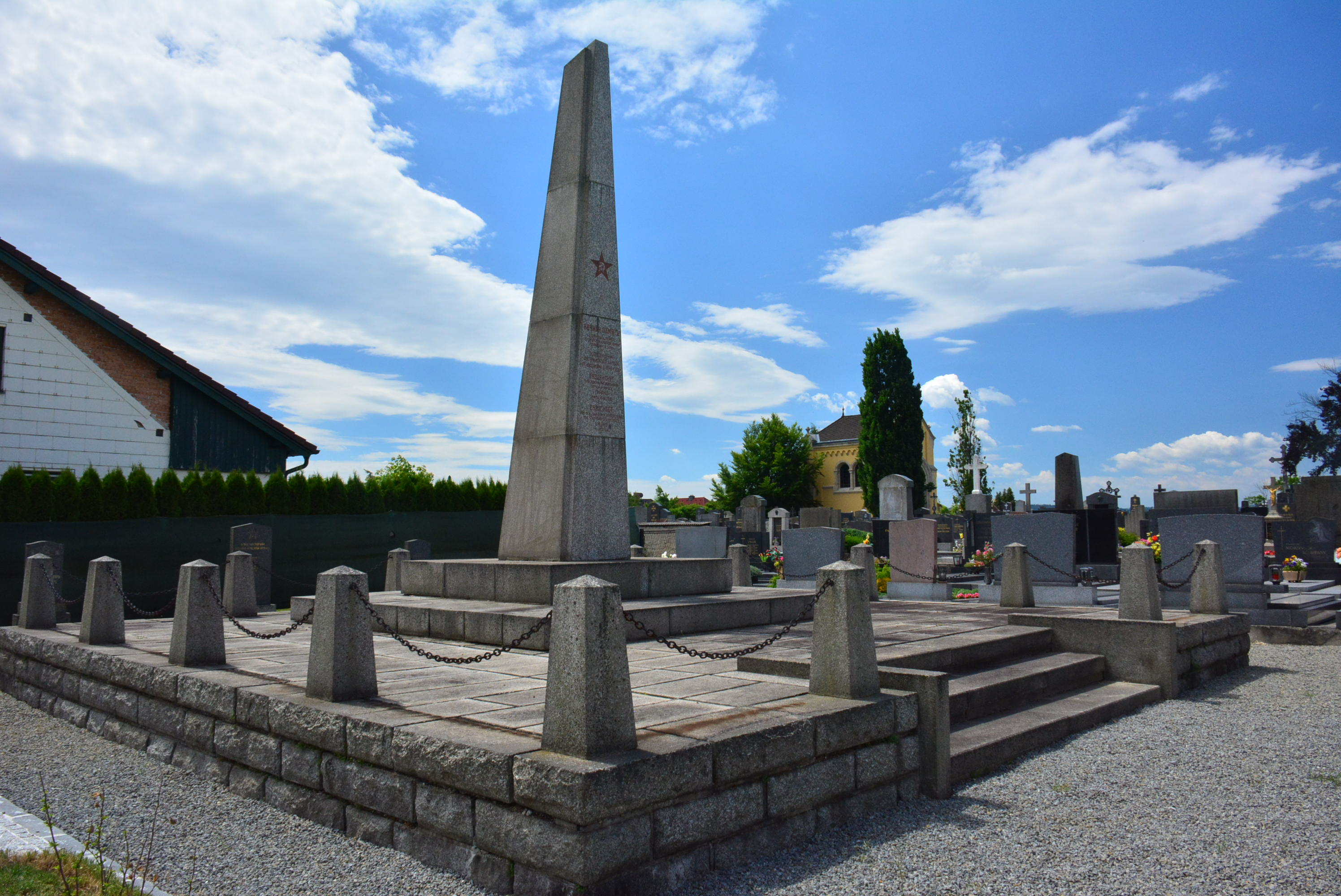 Soldatenfriedhof Gmünd (NÖ, Zweiter Weltkrieg, russisch)